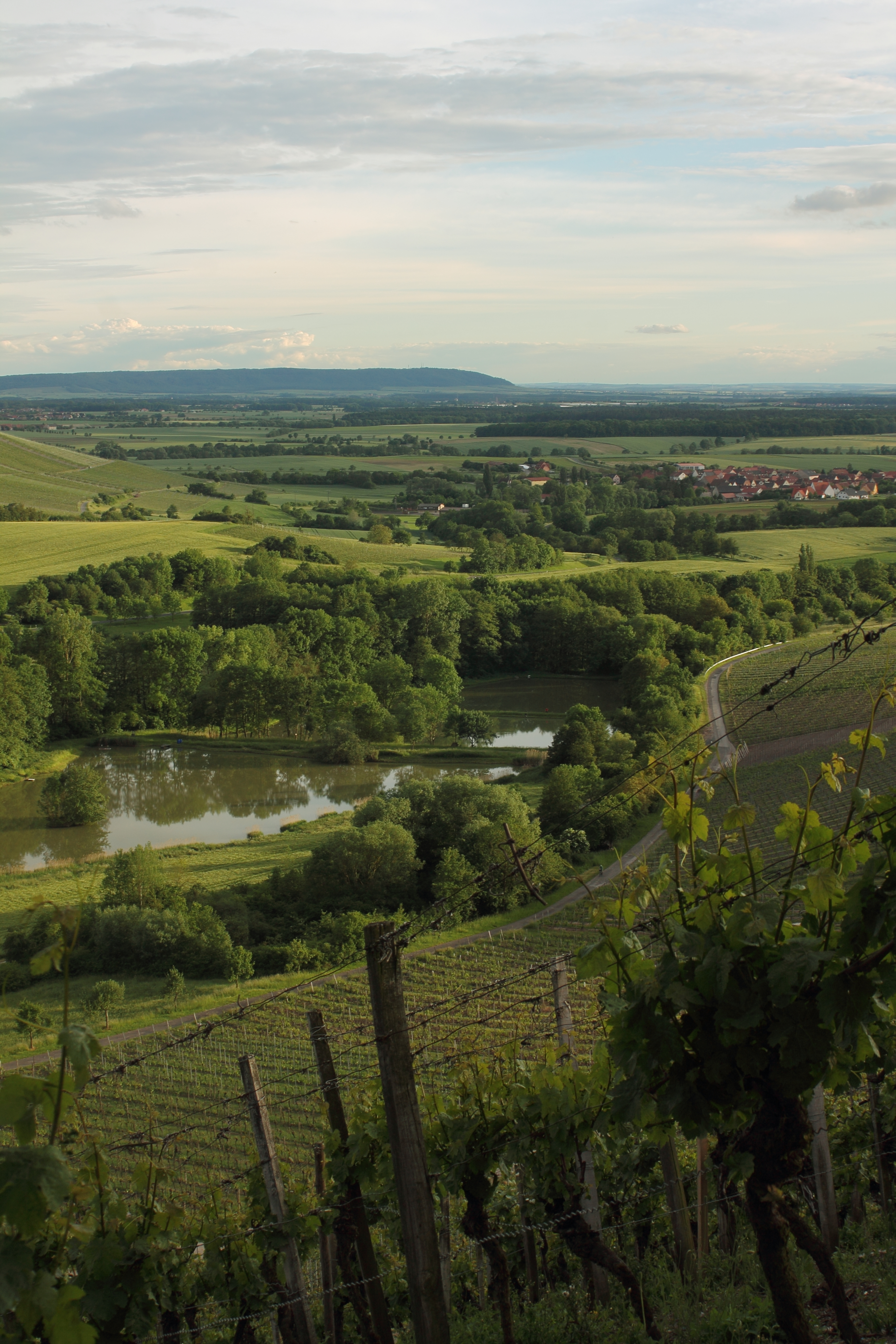 Blick vom Stollberg auf Oberschwarzach und die davorliegenden Fischerteiche, welche im Naturpark Steigerwald liegen. Im Vordergrund sind fränkische Weinberge zu sehen.